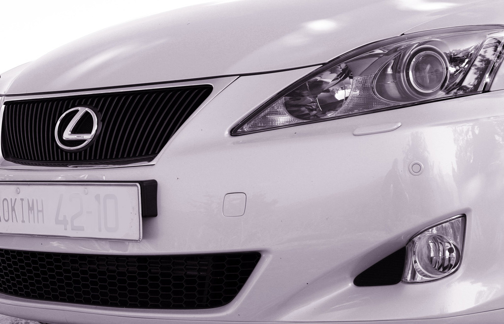 Lexus IS grille